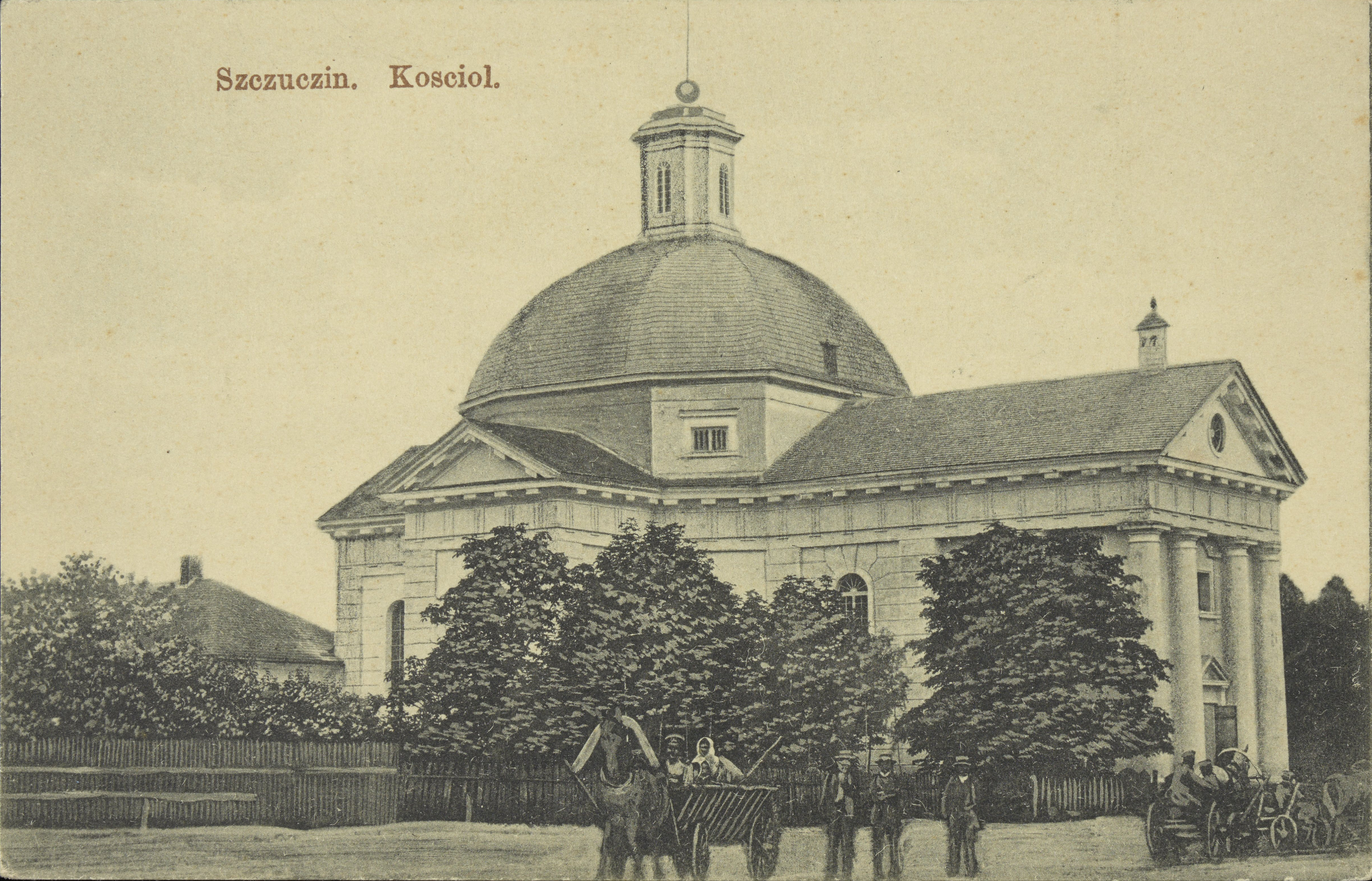 Беларуская (тарашкевіца): Шчучын (Ščučyn), рог пляцу Рынак (plac Rynak) і вуліцы Зялёнай (vulica Zialonaja). Касьцёл Сьвятой Тэрэзы і кляштар піяраў